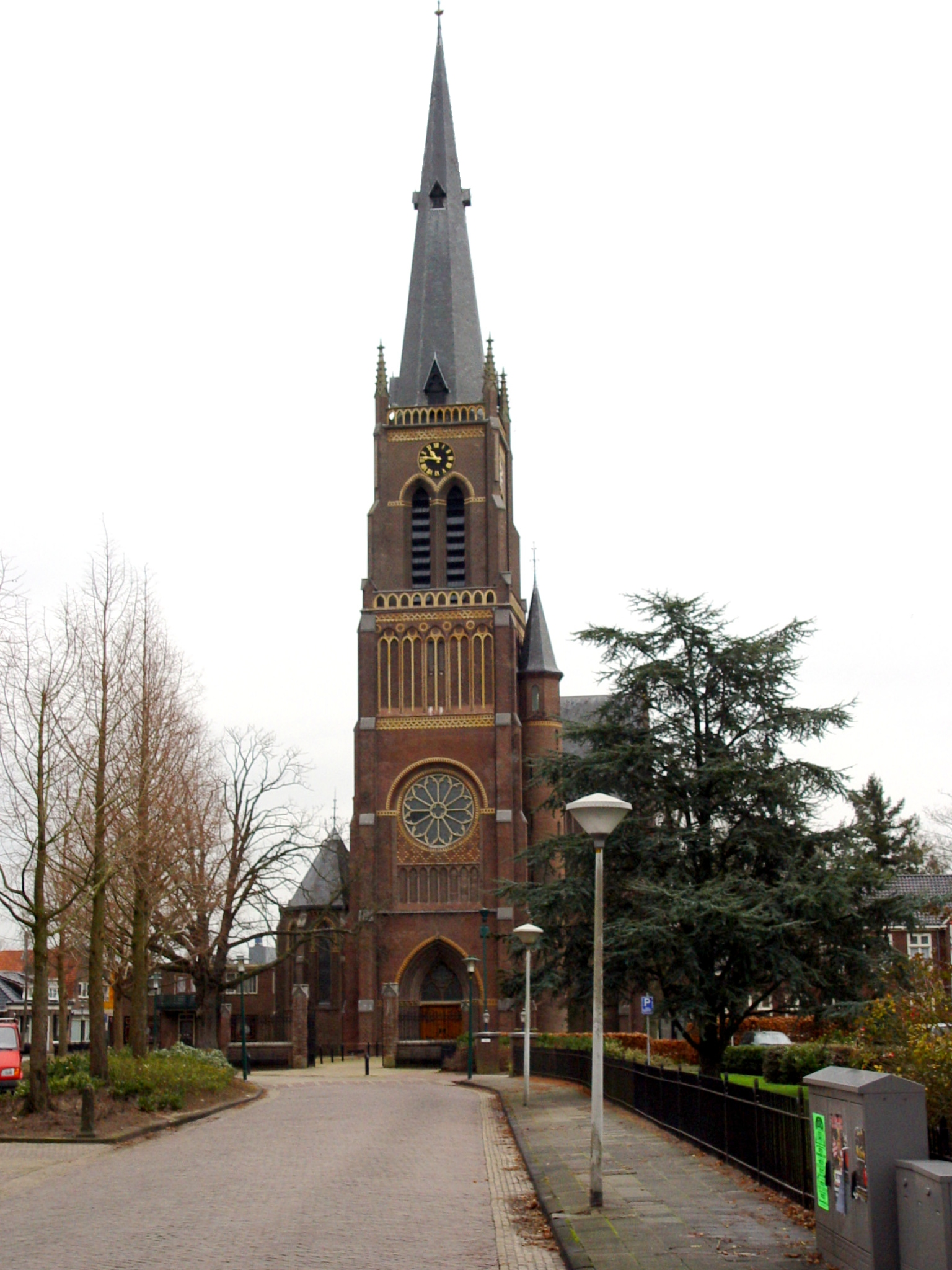 Skarsterlân - Sint Nicolaasga - Katholieke kerk - Sint Nicolaaskerk